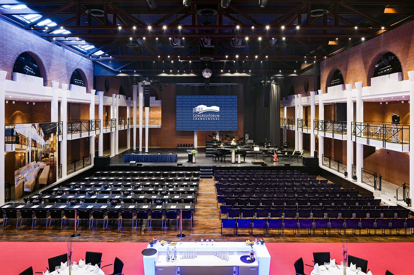 CongressForum Frankenthal Grosser Saal Photography by Yannick Wegener